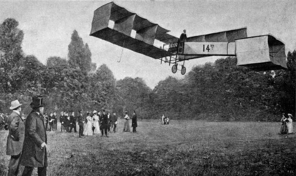 Versión de File:Santos - Nov12 1906.jpg, sin el texto y el borde.